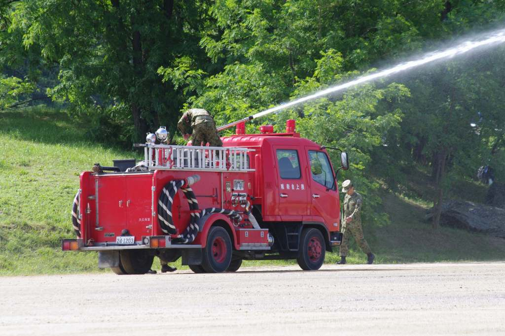 消防車 (陸上自衛隊駐屯地用)